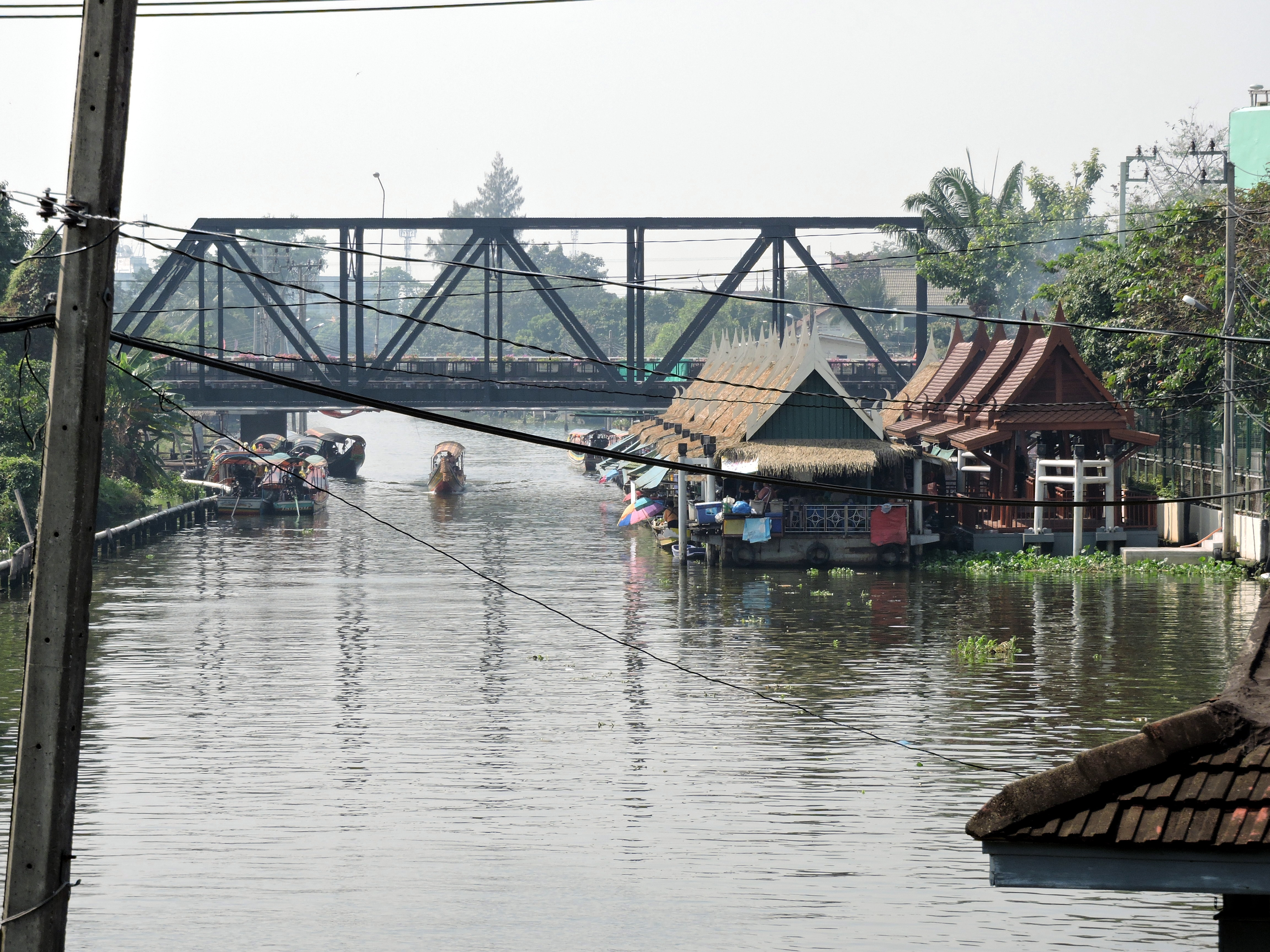 Khlong Chak Phra, Taling Chan, Bangkok, Thailand